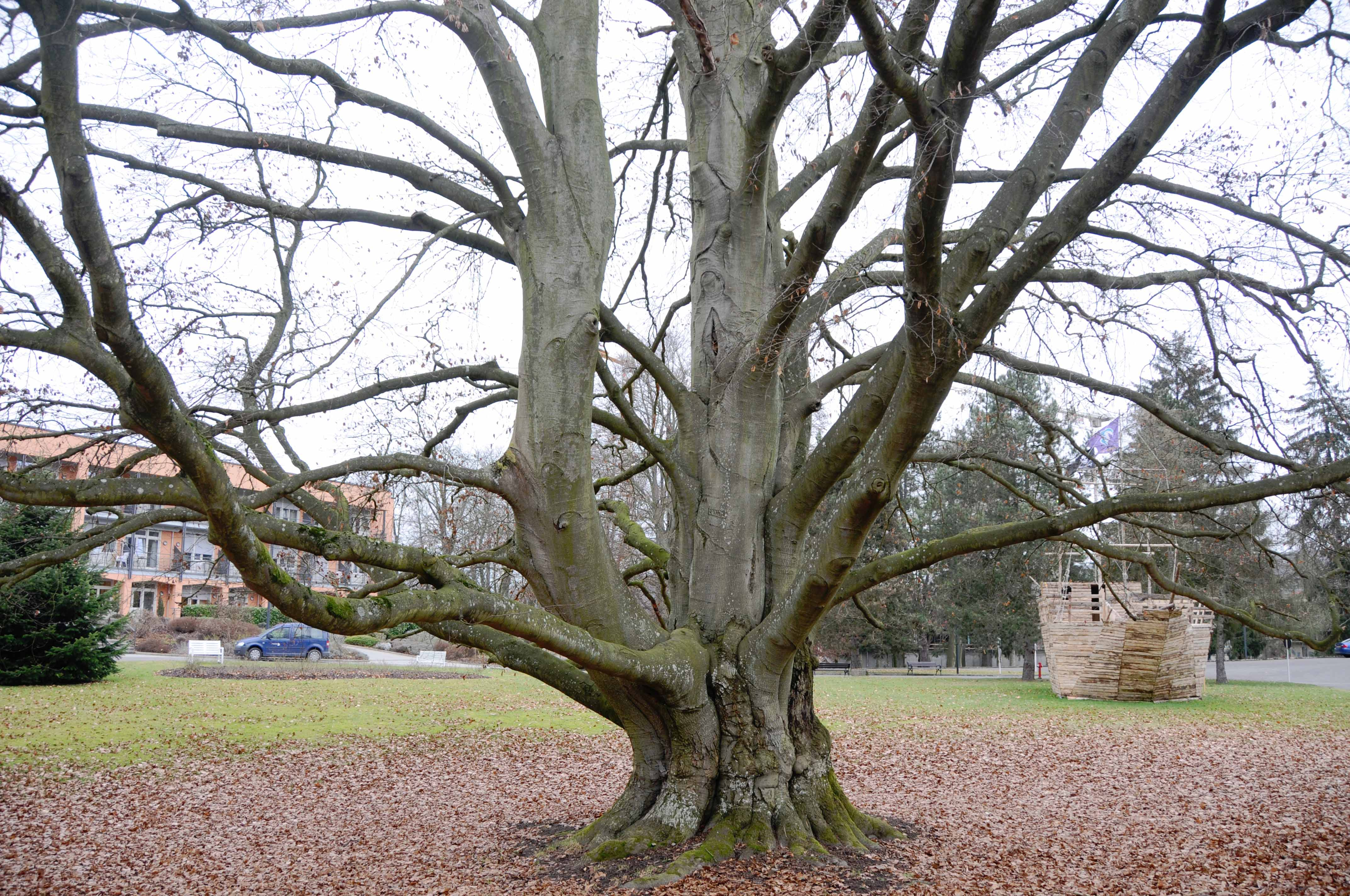 Bluttbuch zu Bouferdeng.